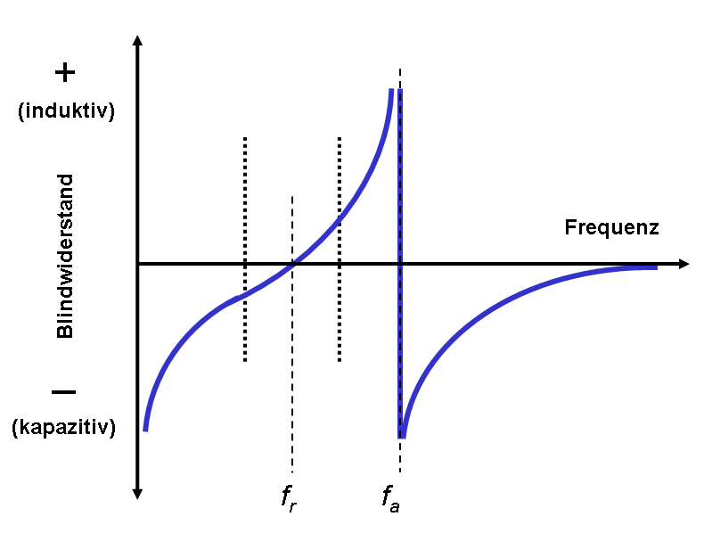 Resonanzkurve eines Schwingquarzes